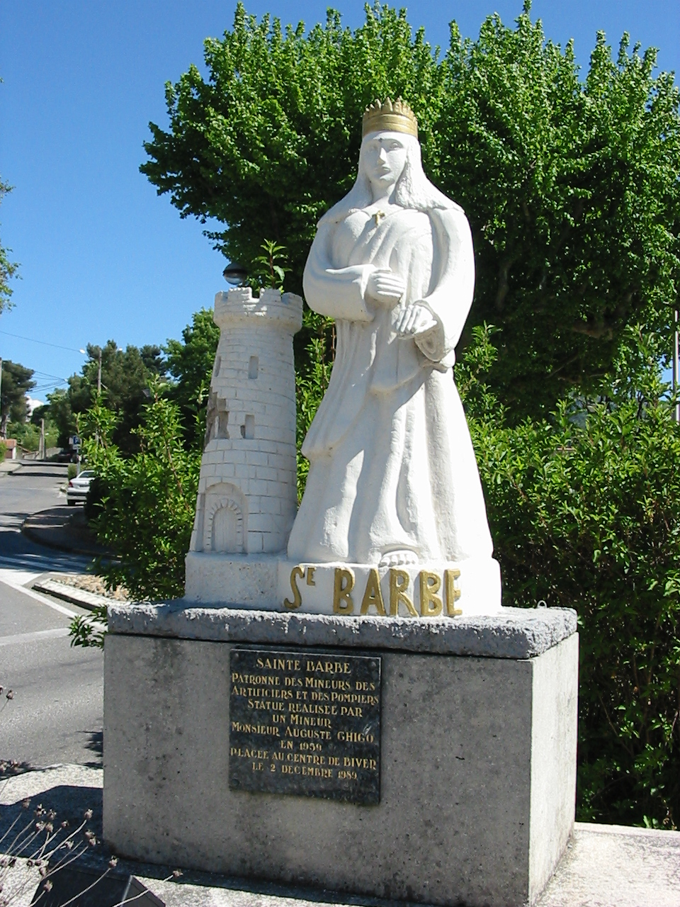 La statue de sainte Barbe au centre du hameau de Biver, dans la commune de Gardanne.